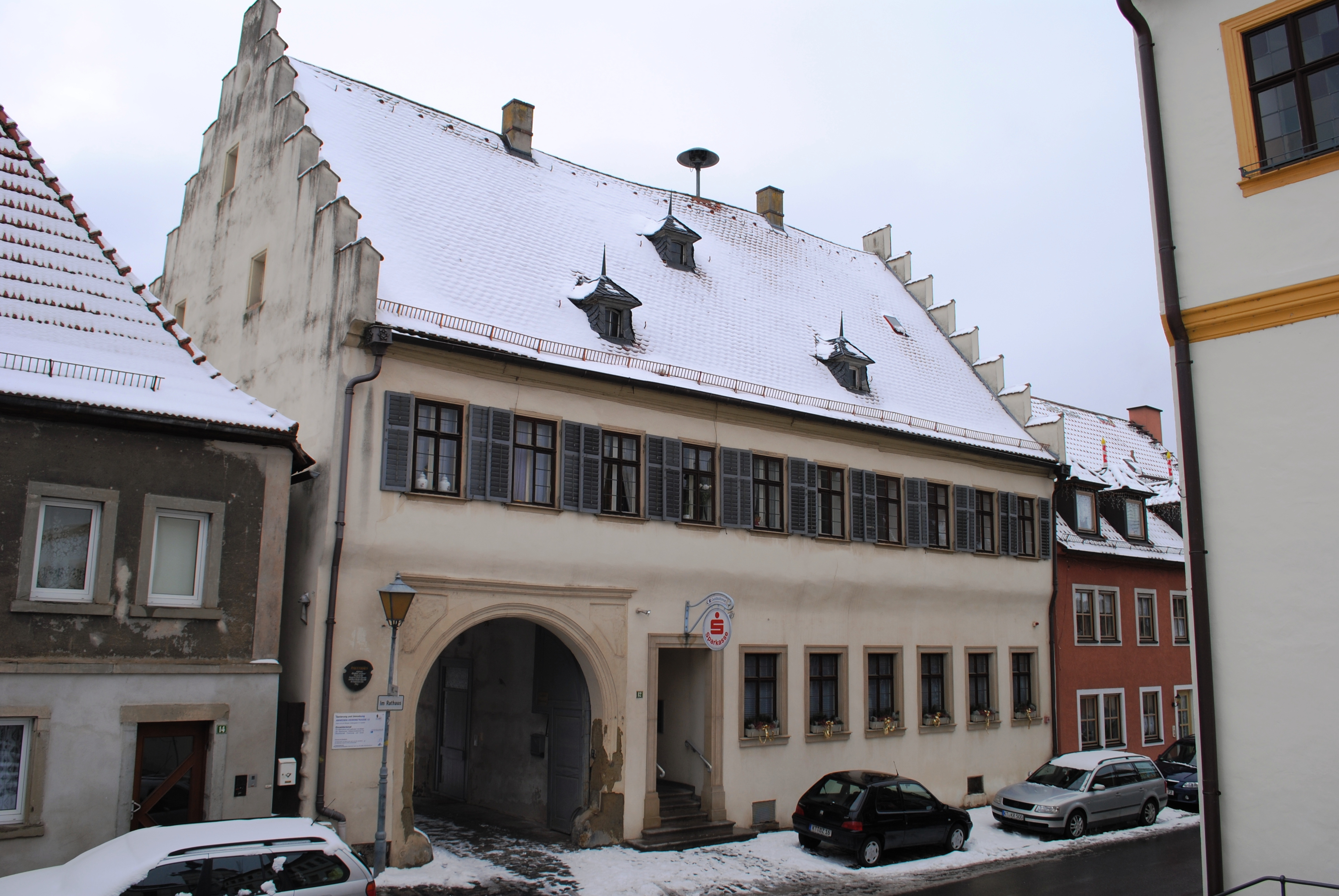 Mainbernheim, Herrnstraße, Paulshaus, zweigeschossiger traufseitiger Satteldachbau mit Treppengiebeln, rundbogiger Tordurchfahrt und verputztem Fachwerkobergeschoss, 2. H. 16. Jahrhundert; rückwärtiger Flügel, zweigeschossiger Satteldachbau mit Zwischengeschoss, Treppengiebeln und weit vorkragendem von Steinsäulen getragenem Obergeschoss, Bruchsteinmauerwerk, teilweise Fachwerk, 16./17. Jahrhundert